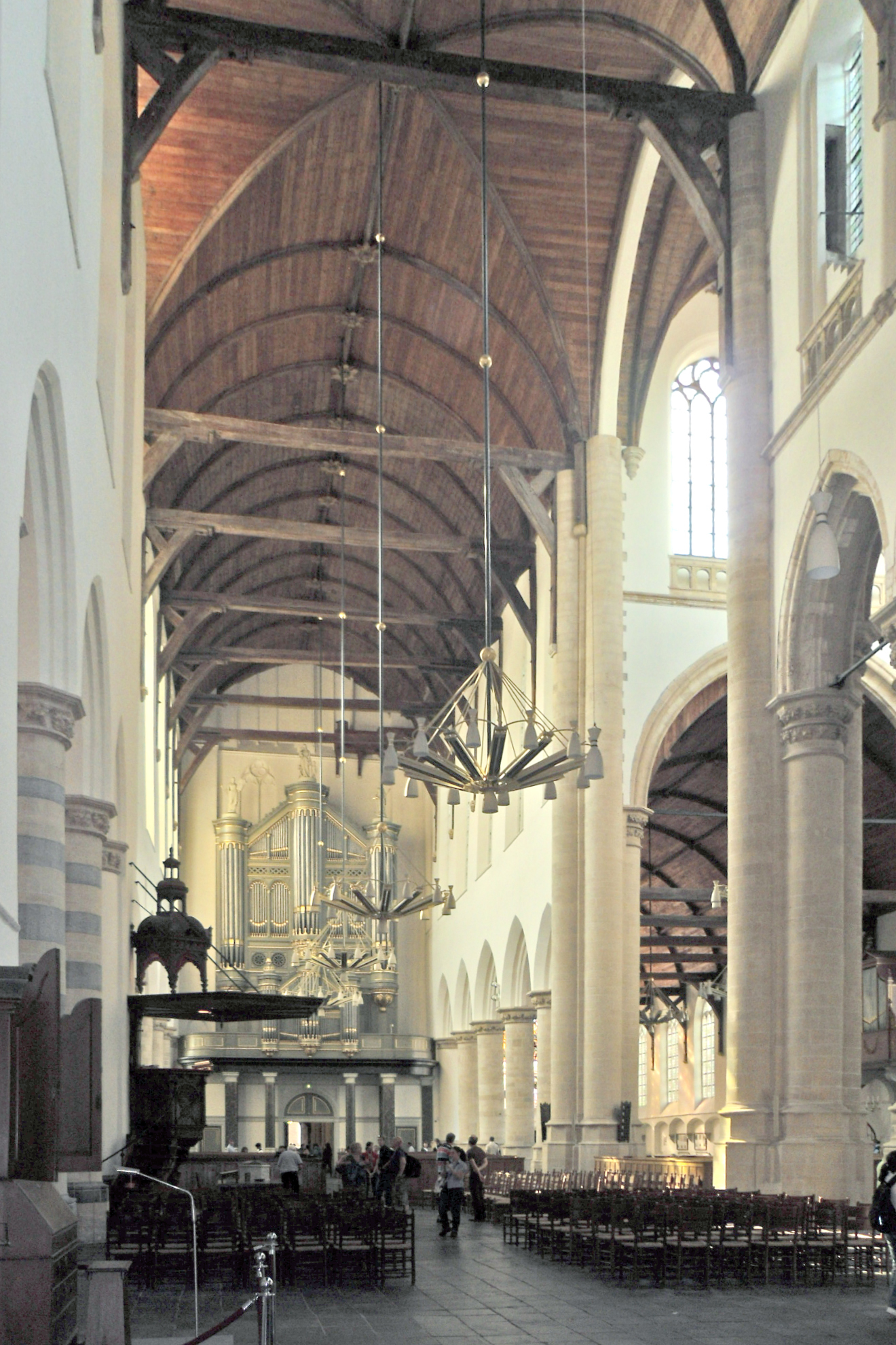 Interieur van de Oude Kerk te Delft